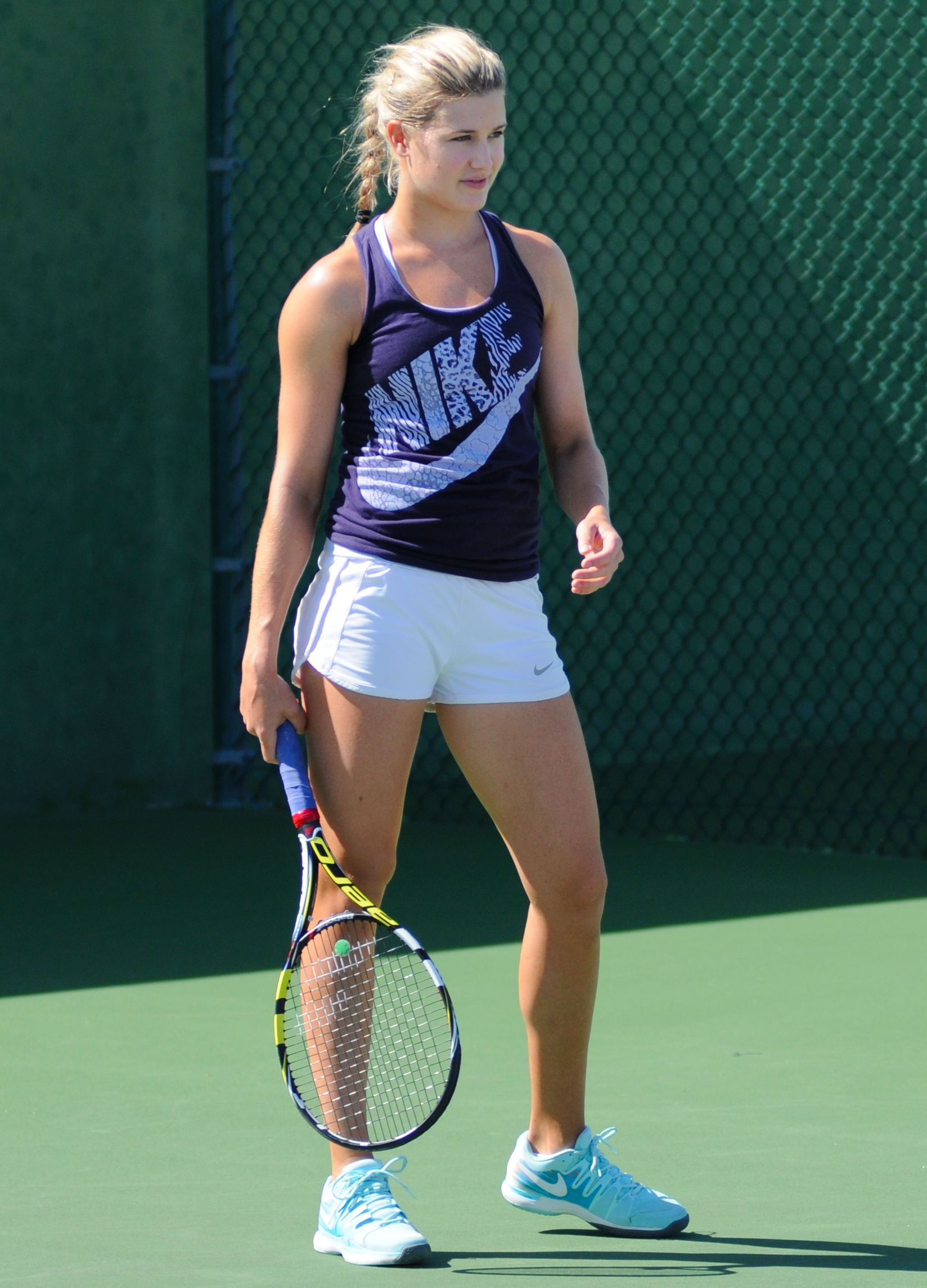 2014 BNP Paribas Open